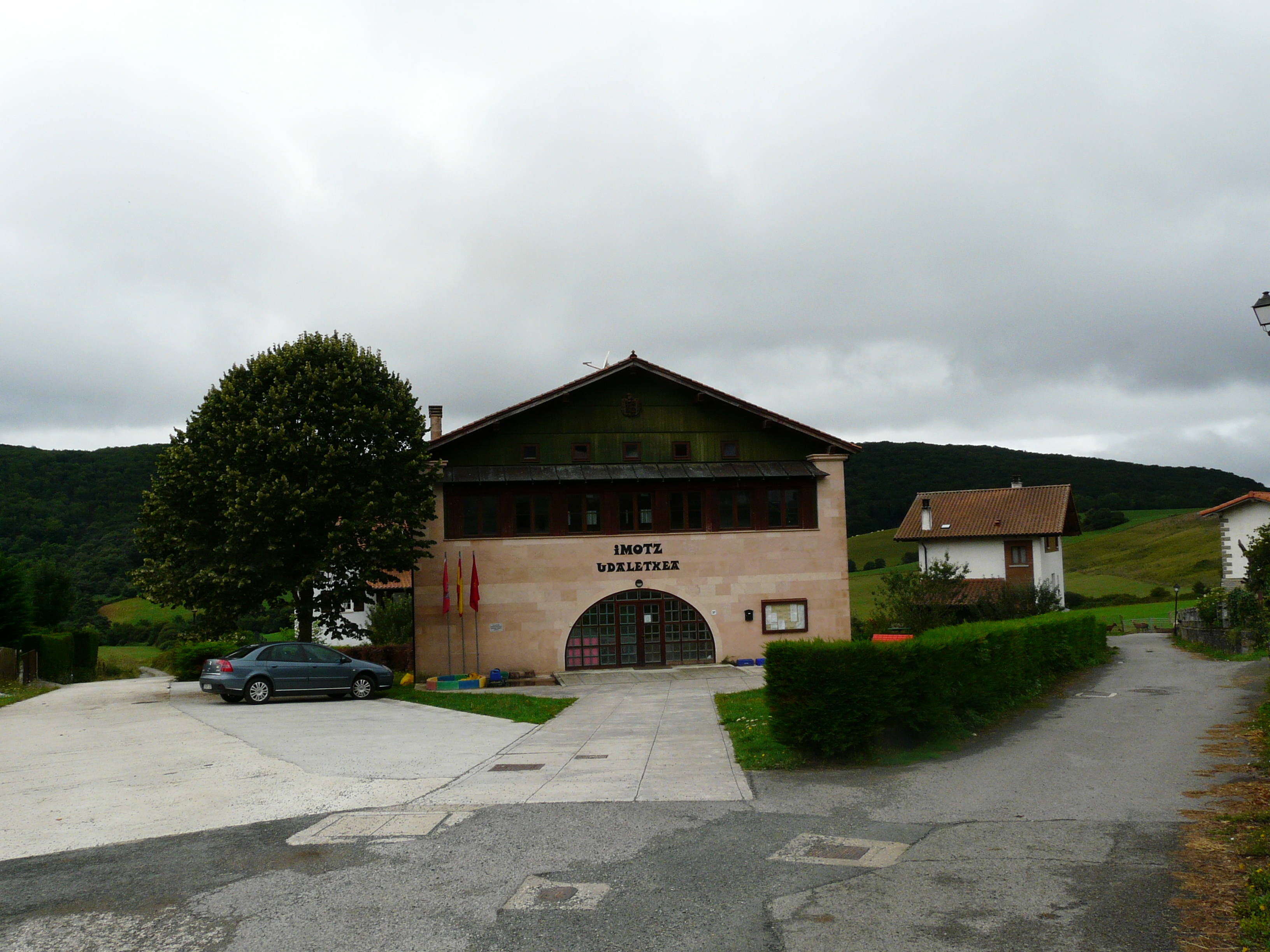 Ajuntament d'Imotz